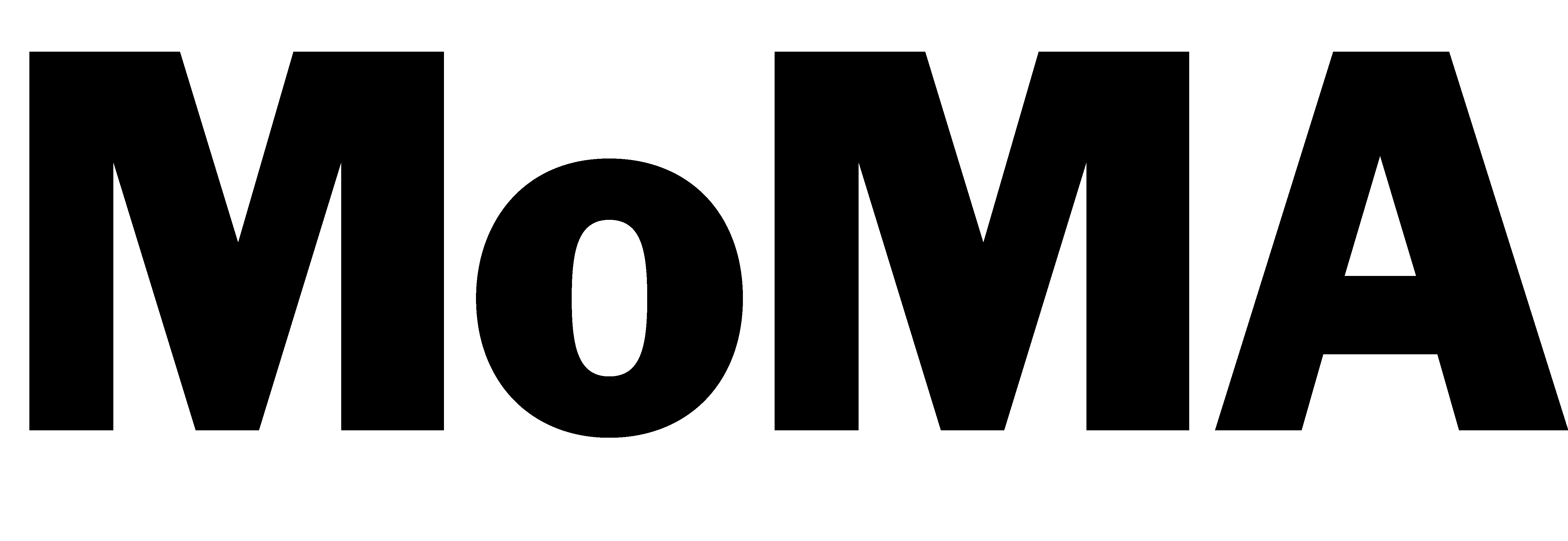 MoMA - Latin America in Construction, 19 de Julio de 2015